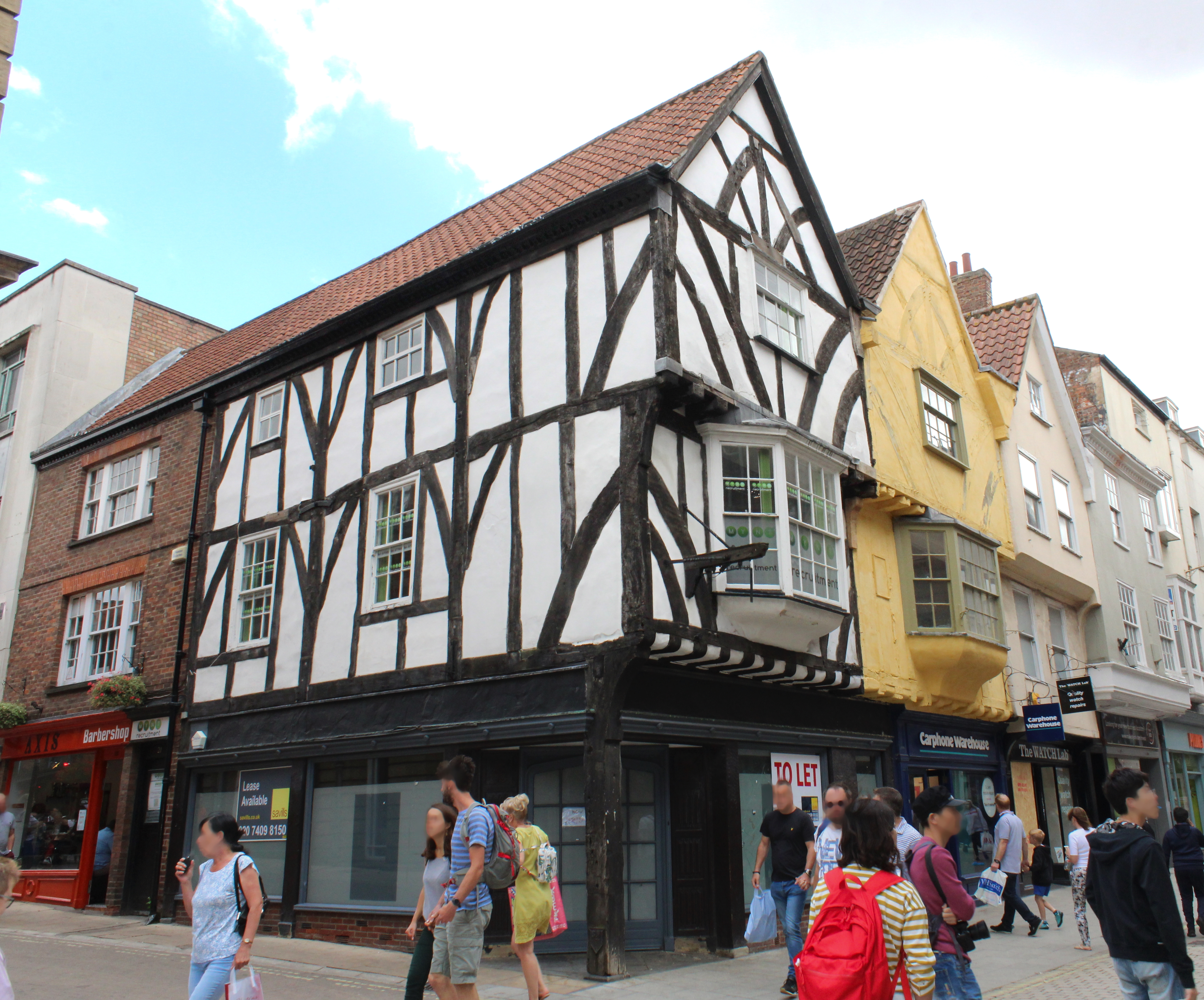 Maisons du 18 au 22 Coney Street, York.